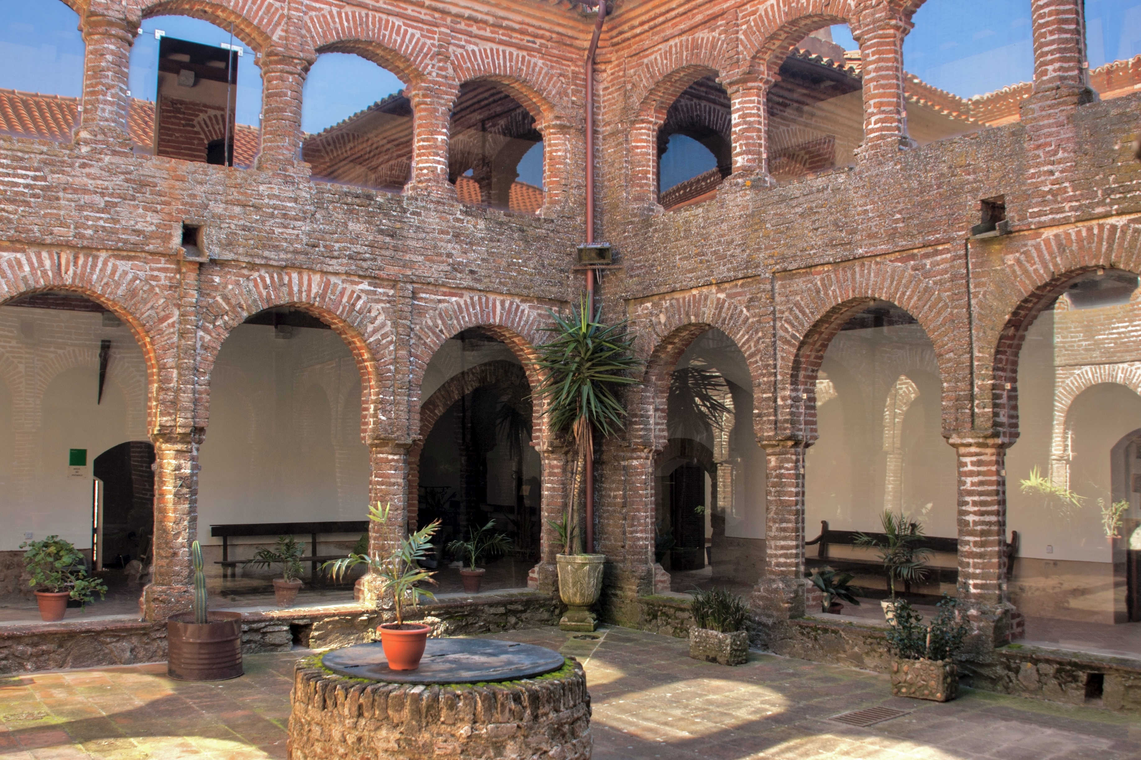 Claustro del Monasterío de Tentudía